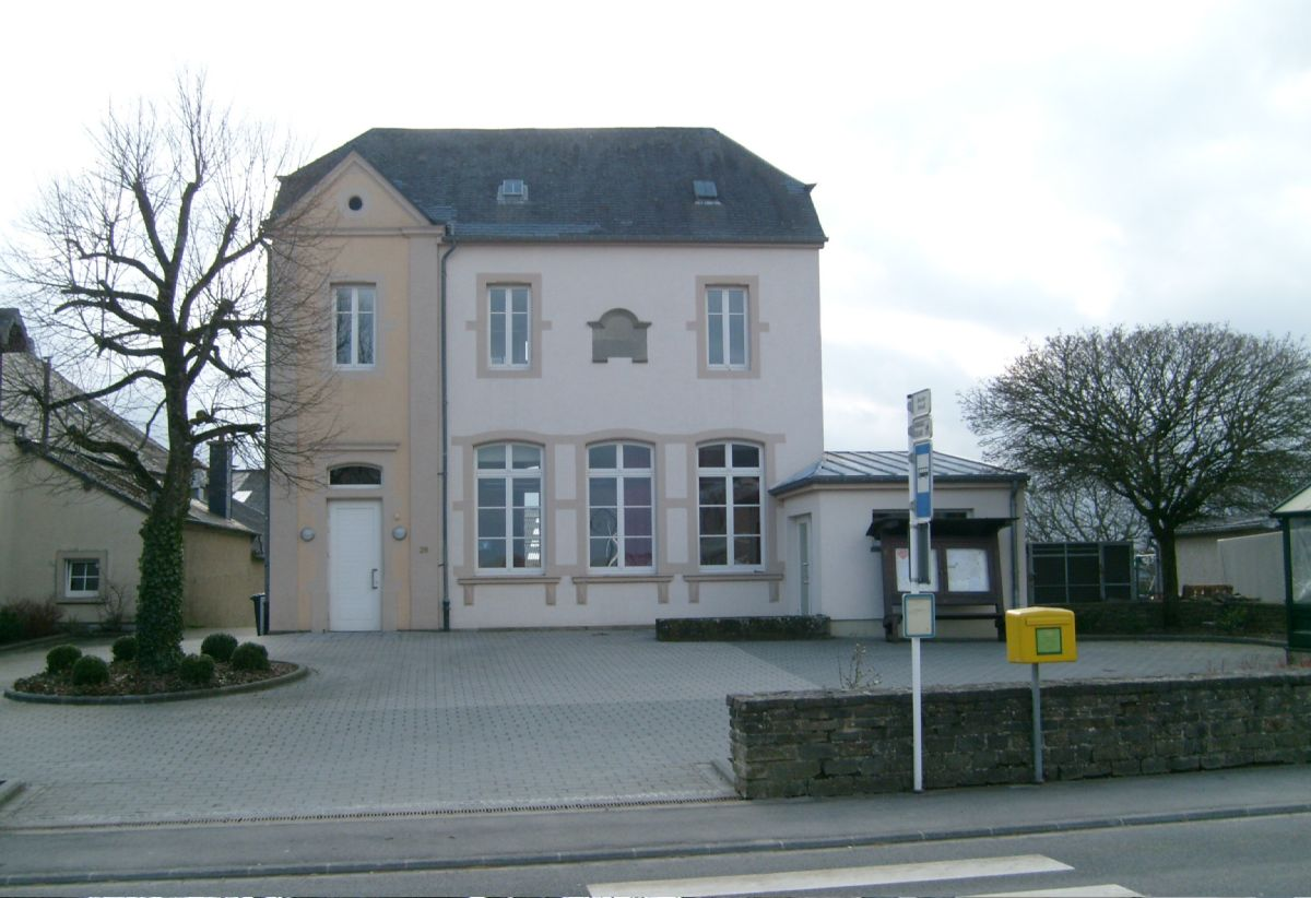 Sujet: D'Grooljer Schoul, haut Kulturzentrum a VerÃ¤inshaus. 03.04.2008. Auteur: Christian Ries